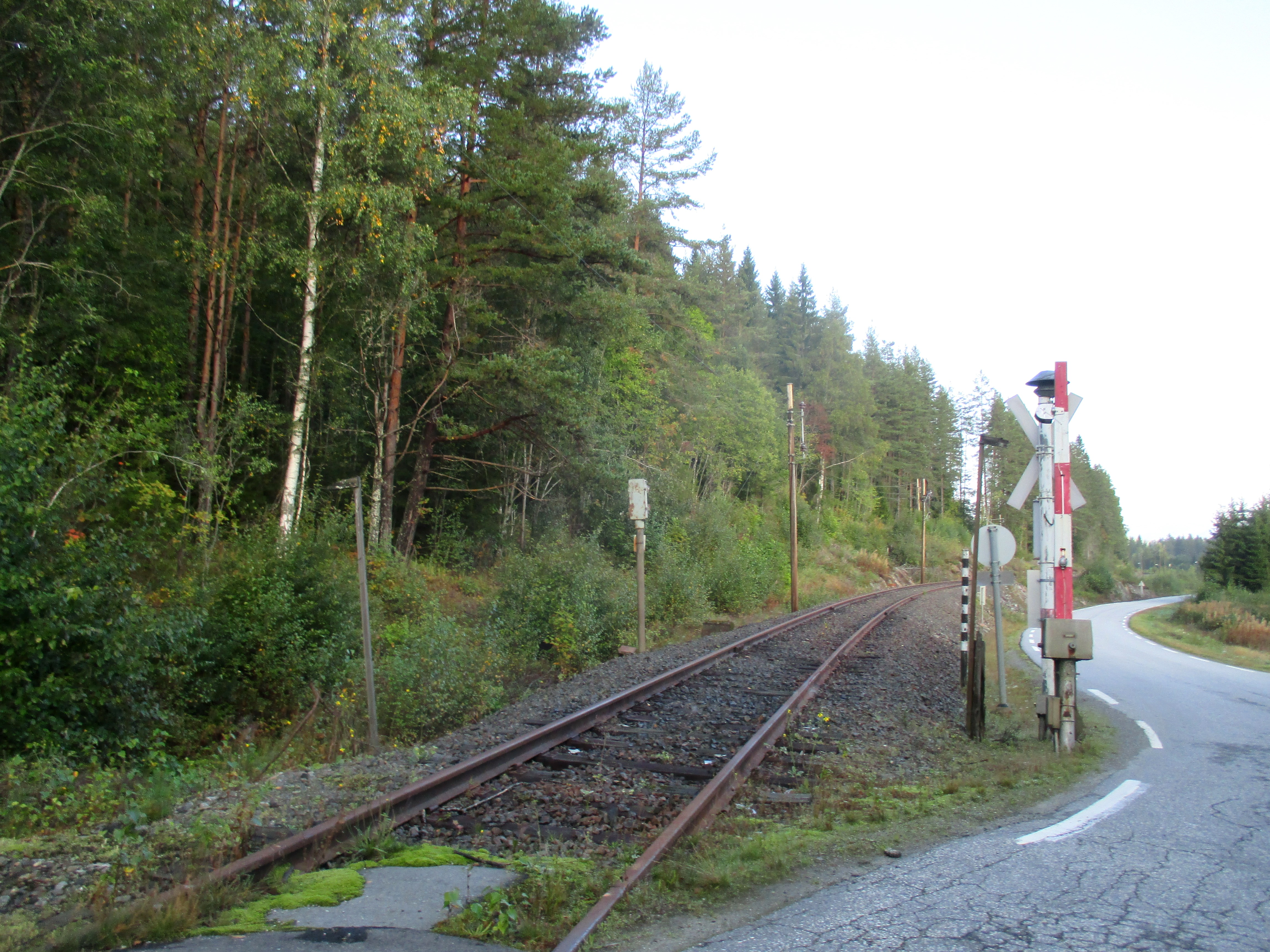 Fylkesvei 361 krysser Tinnosbanen et stykke sørøst for Grønvollfoss stasjon.